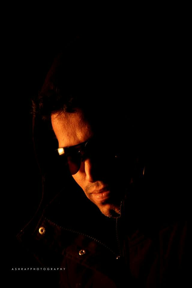 ഒരു വ്യക്തിയുടെയോ ഒരു കൂട്ടം ആളുകളുടെയോ മുഖഭാവങ്ങൾ ,വ്യക്തിത്വം ,അവസ്ഥ ,ഭാവഭിനയങ്ങൾ തുടങ്ങിയവ ചിത്രീകരിക്കുന്ന രീതിയാണ്.